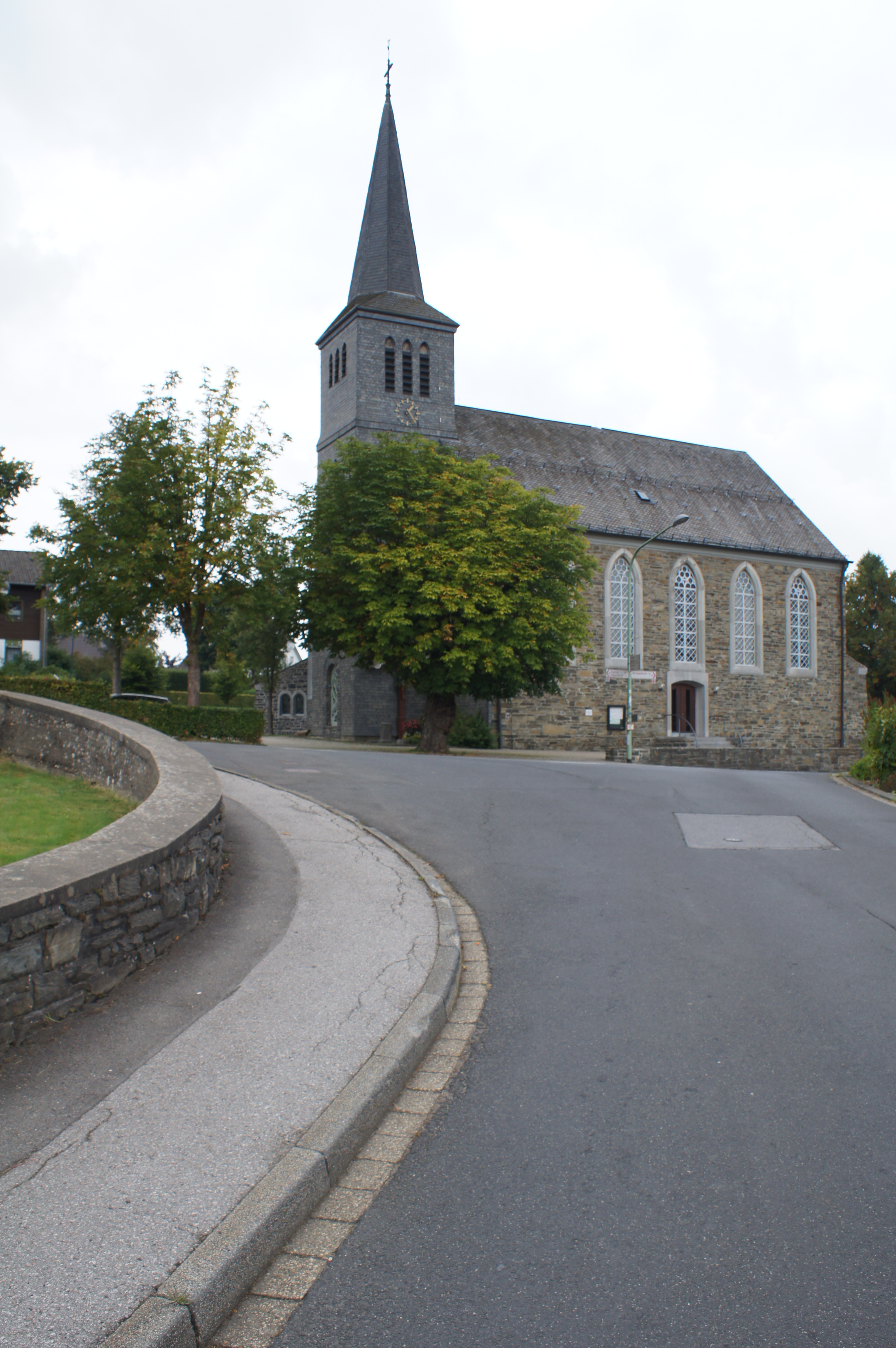 Mützenich - Eupener Strasse 74 KircheThis is a photograph of an architectural monument., no. 47